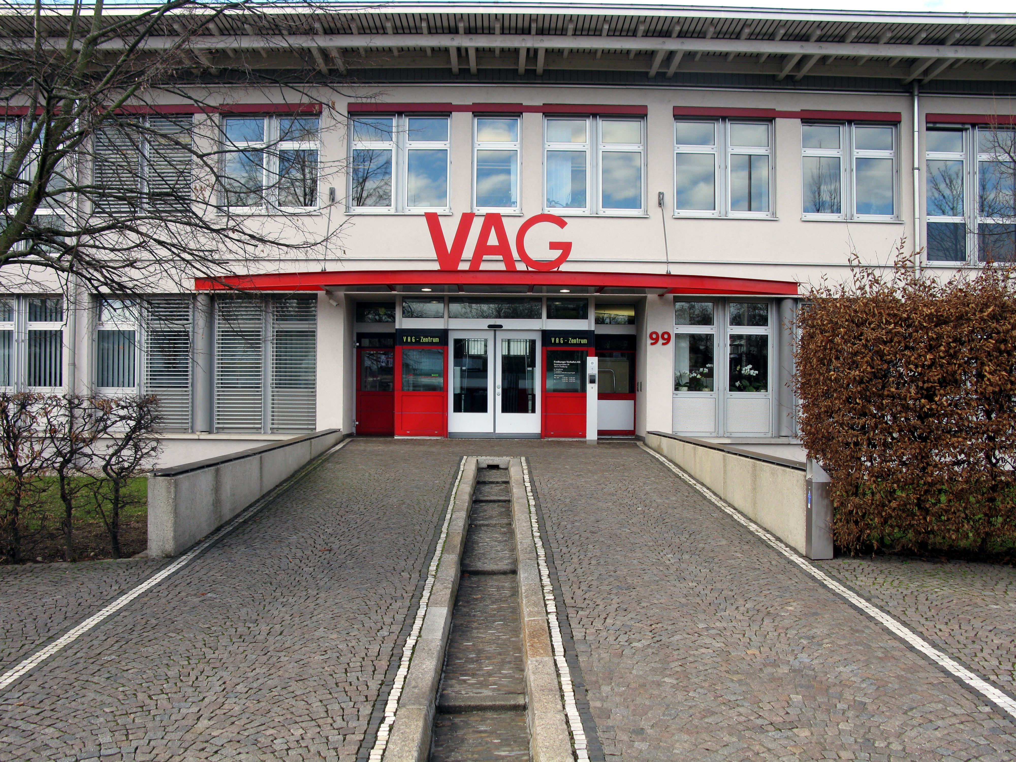 Verwaltungsgebäude der Freiburger Verkehrs AG